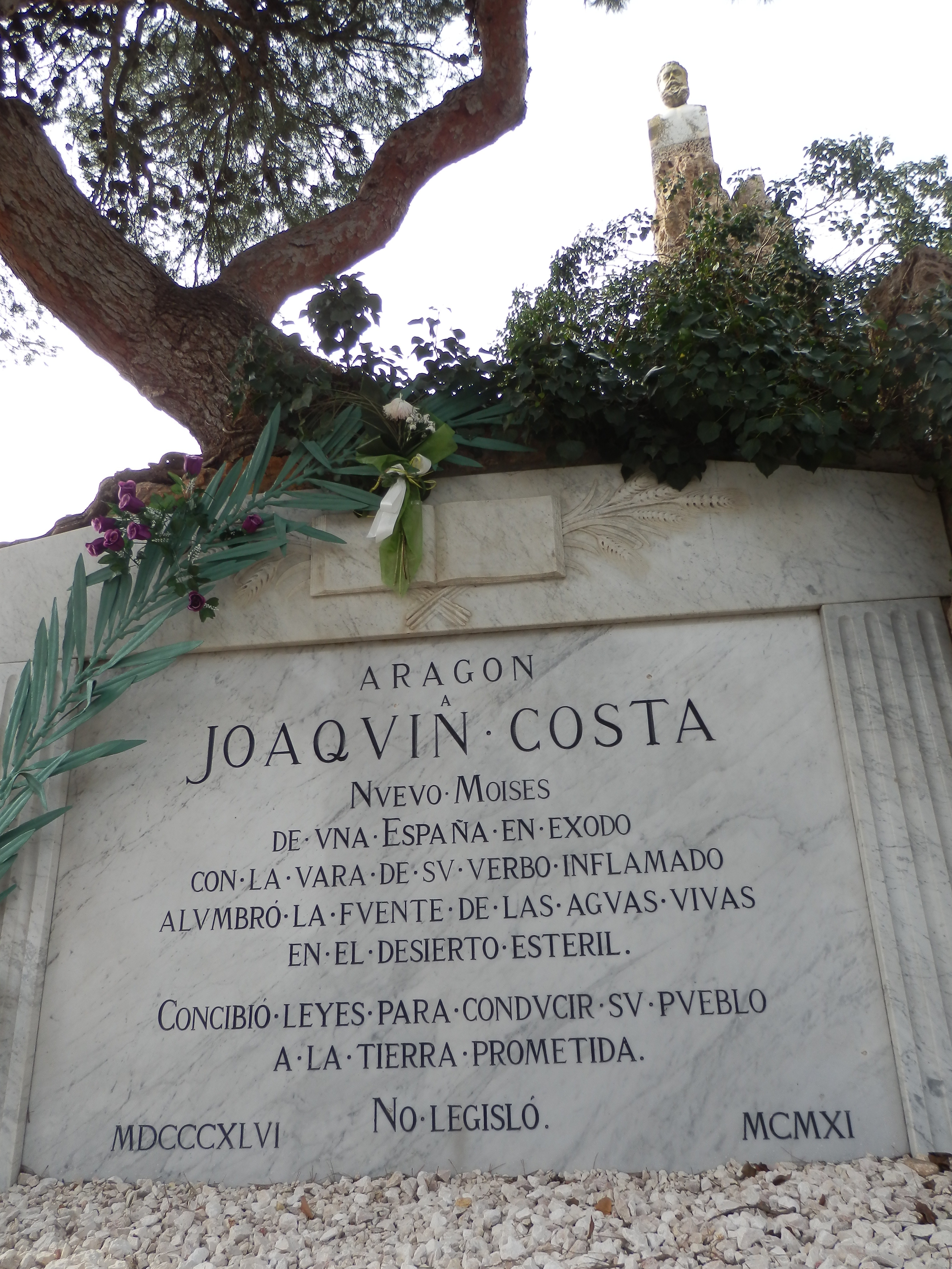 Panteón dedicado a Joaquín Costa en el cementerio de Torrero de Zaragoza.